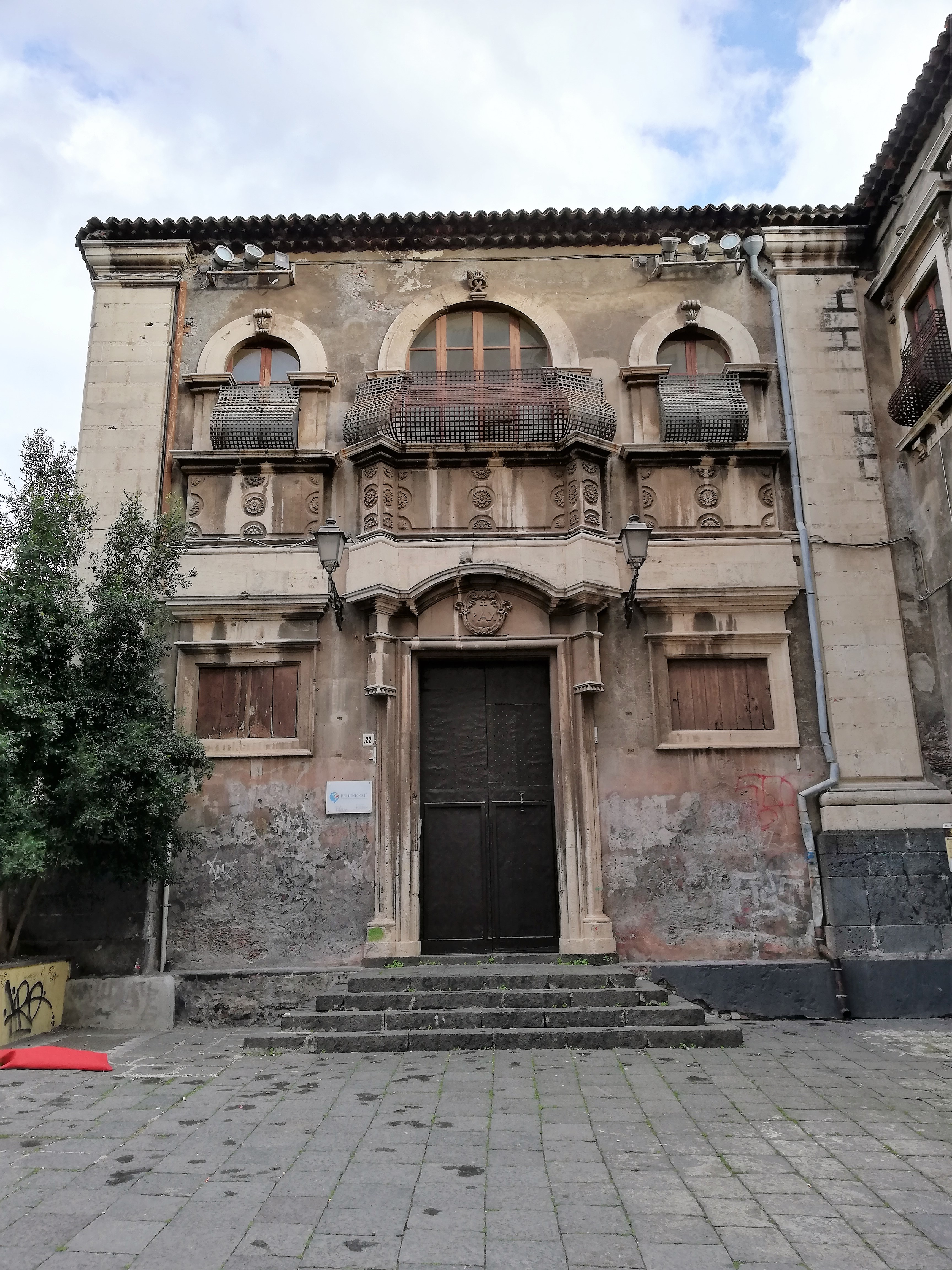 Monastero.